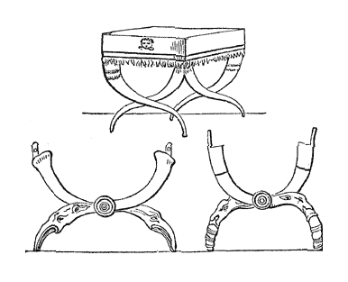 Curule chair, sella curulis, Museo Borbonico, vol. vi. tav. 28